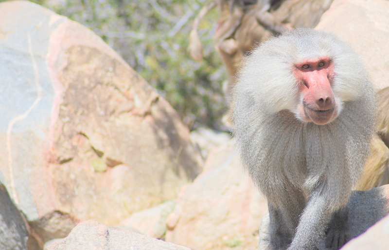 KING OF THE MONKEY